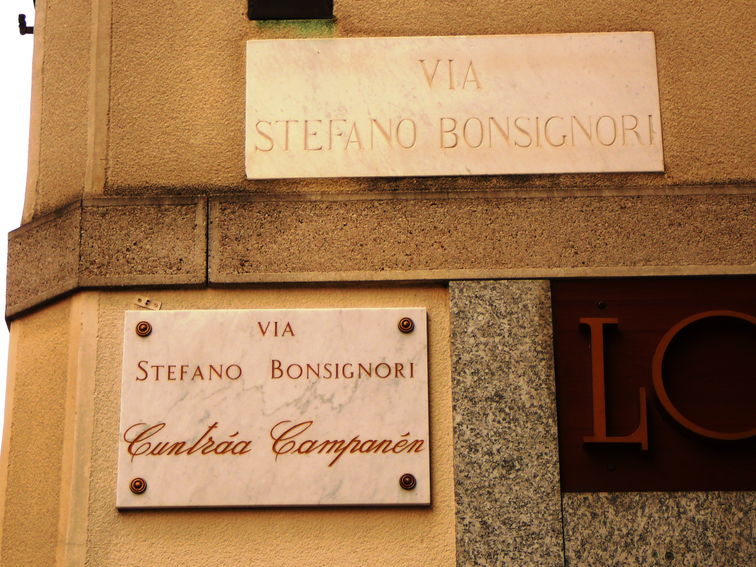 Via Bonsignori - contrada Campanile